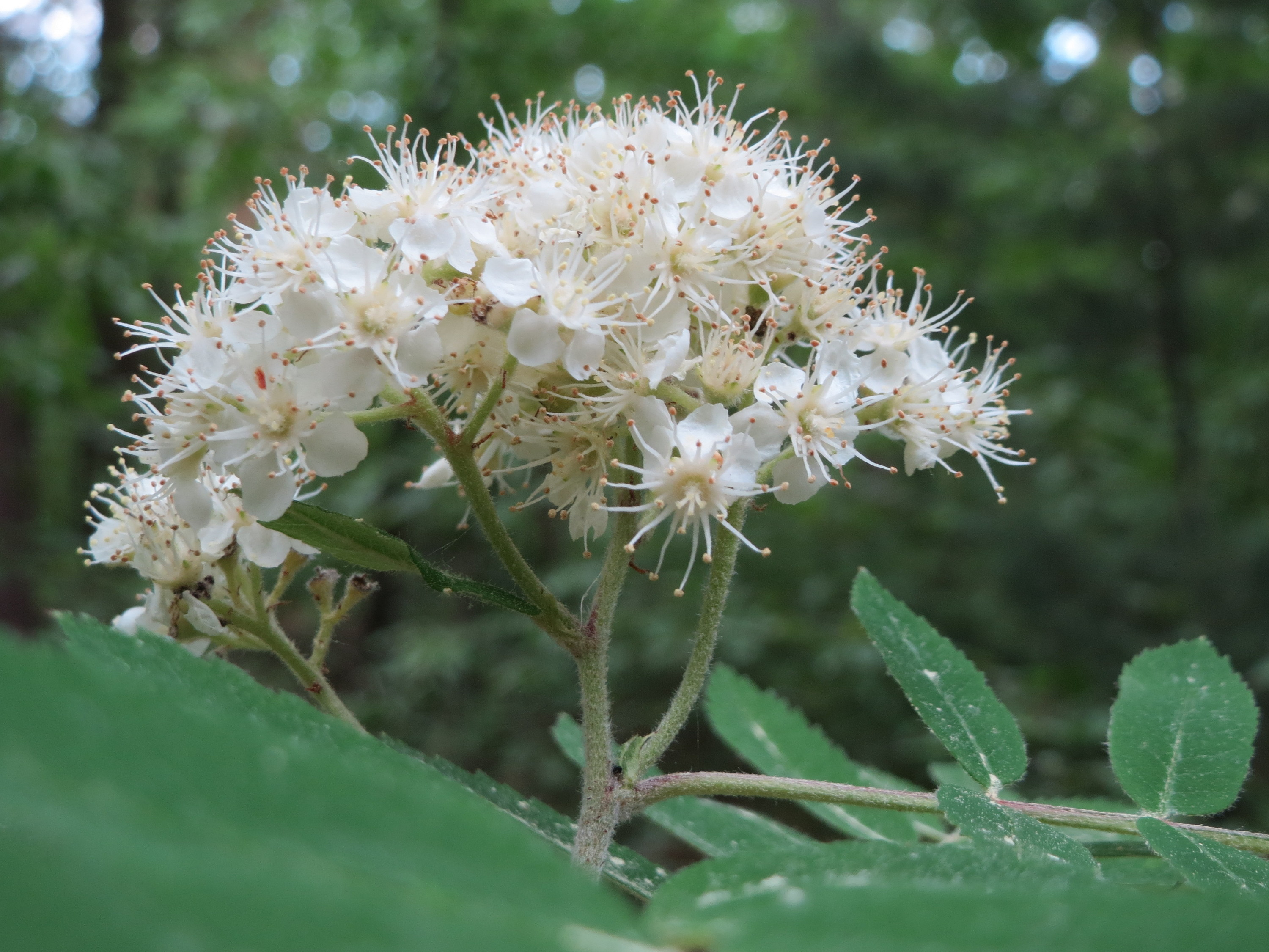 Eberesche (Sorbus aucuparia) im Schwetzinger Hardt